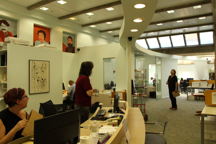 חדר העיון במכון גנזים